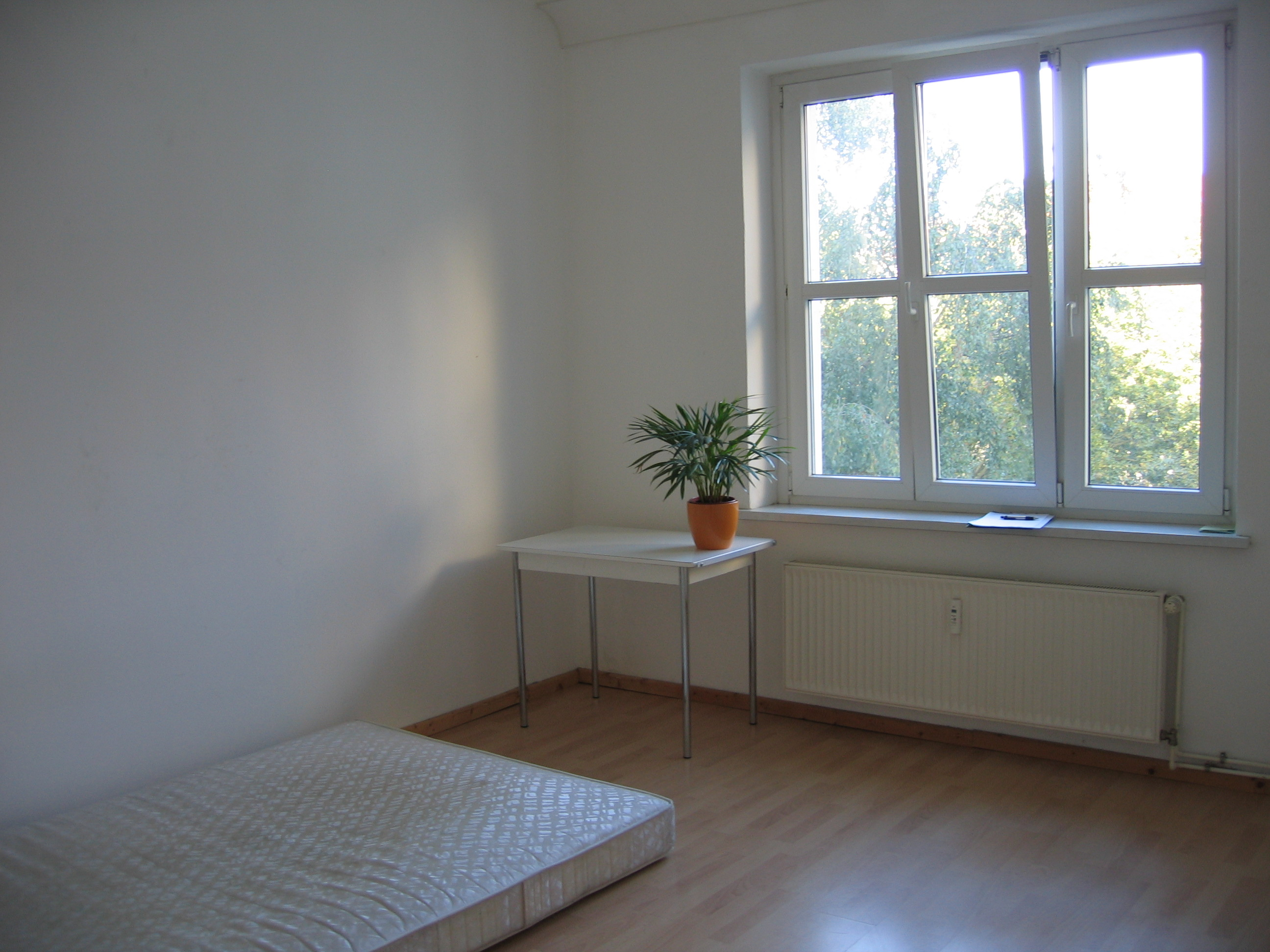 Bedroom